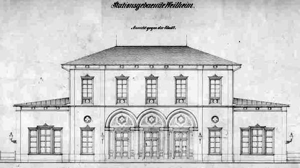 Zeichnung des Empfangsgebäudes des Bahnhofs Weilheim (Oberbay) im Eröffnungsjahr 1866